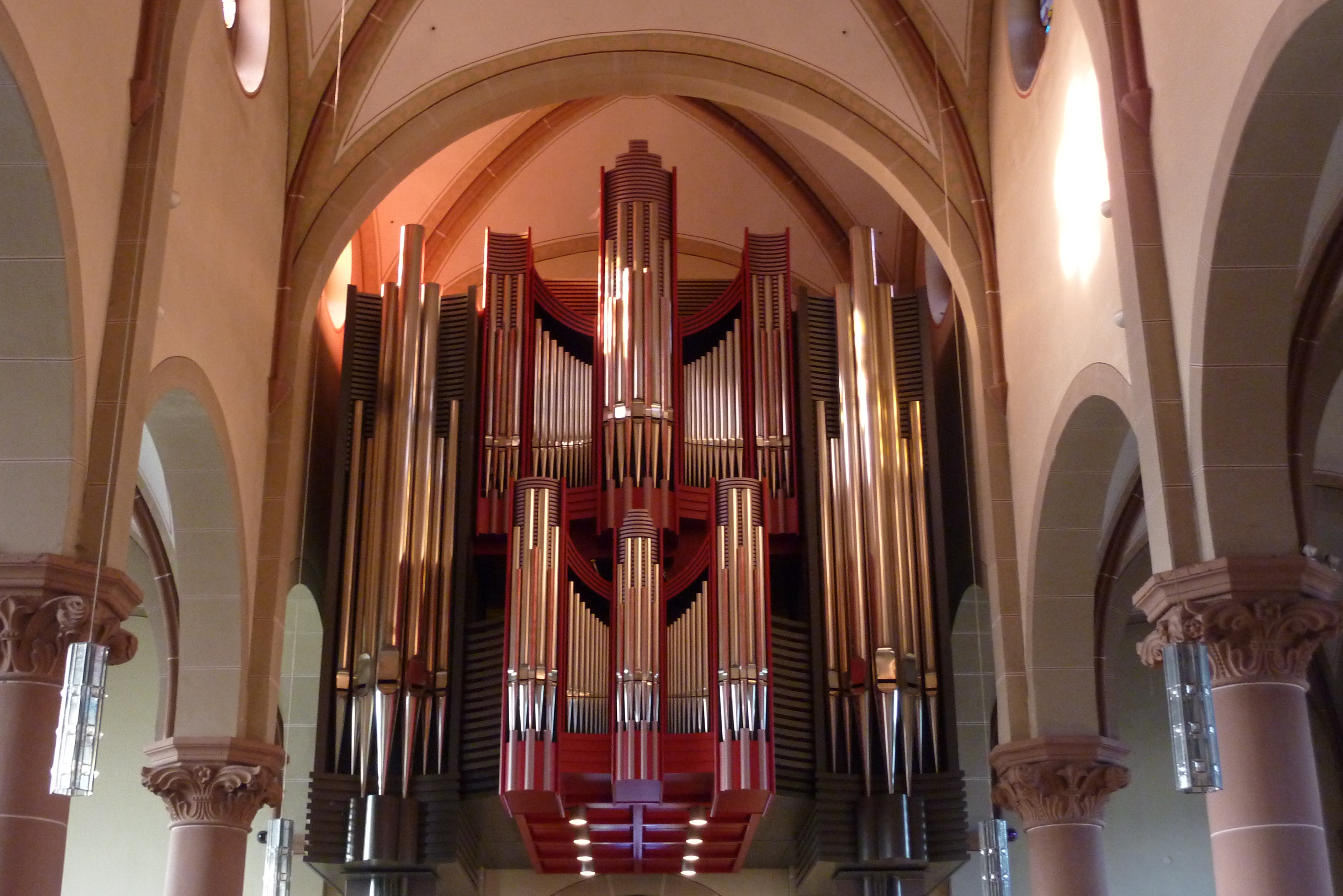 Bensberg, katholische Pfarrkirche St. Nikolaus, Orgel der Fa. Rieger aus Schwarzach